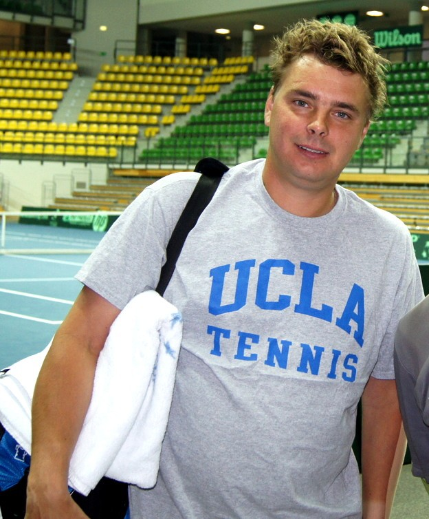 Marcin Matkowski, polski tenisista.